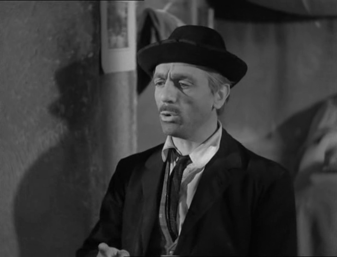 Italian actor Eduardo De filippo in a scene of the film A che servono questi quattrini?